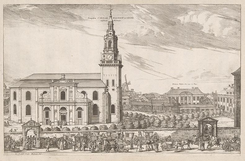 Templum S:t Mariae Magdalae in Suburbio australi Holmiae : [Bild] / W. Swidde Sculp.